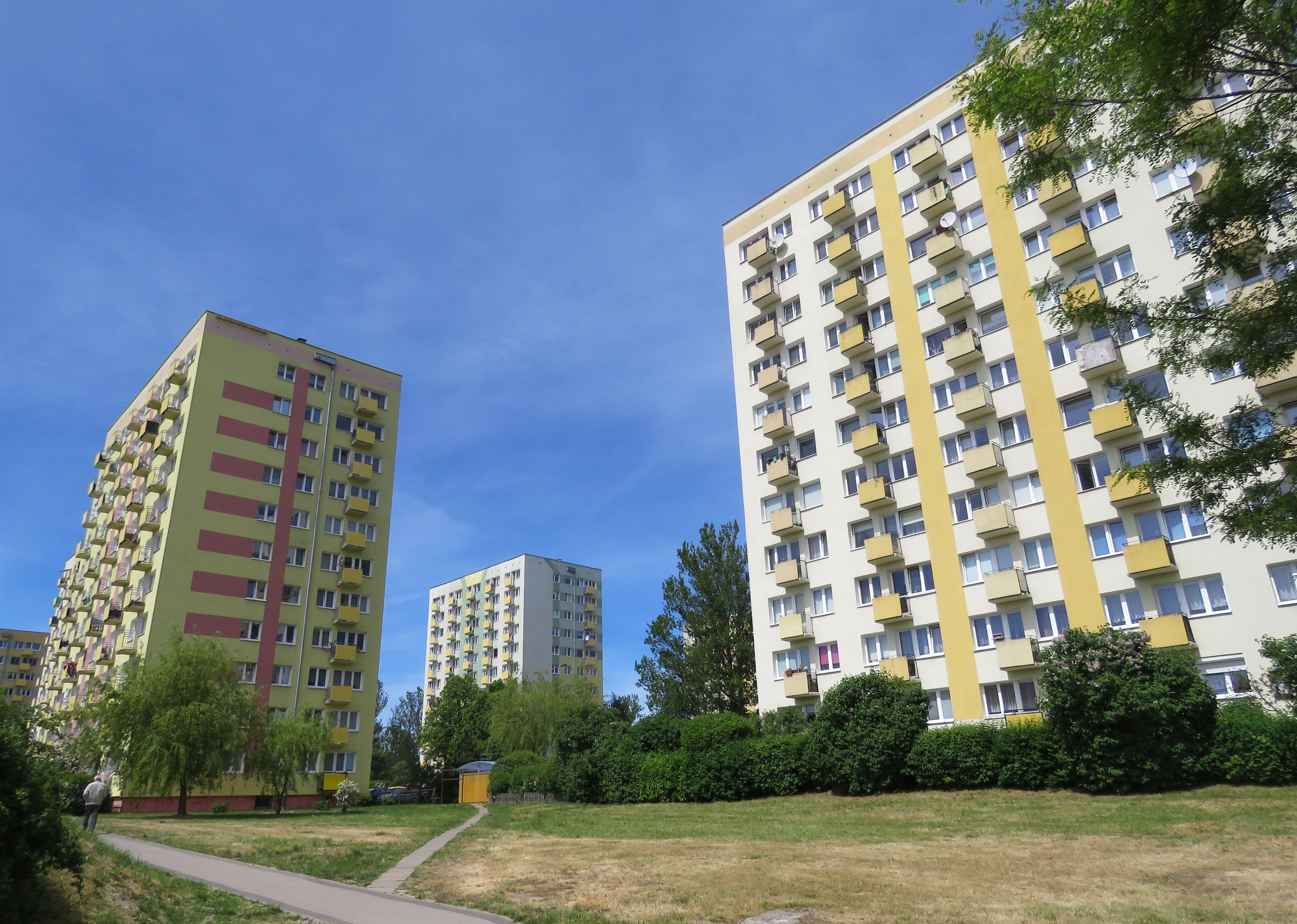 WITOMINO - RADIOSTACJA